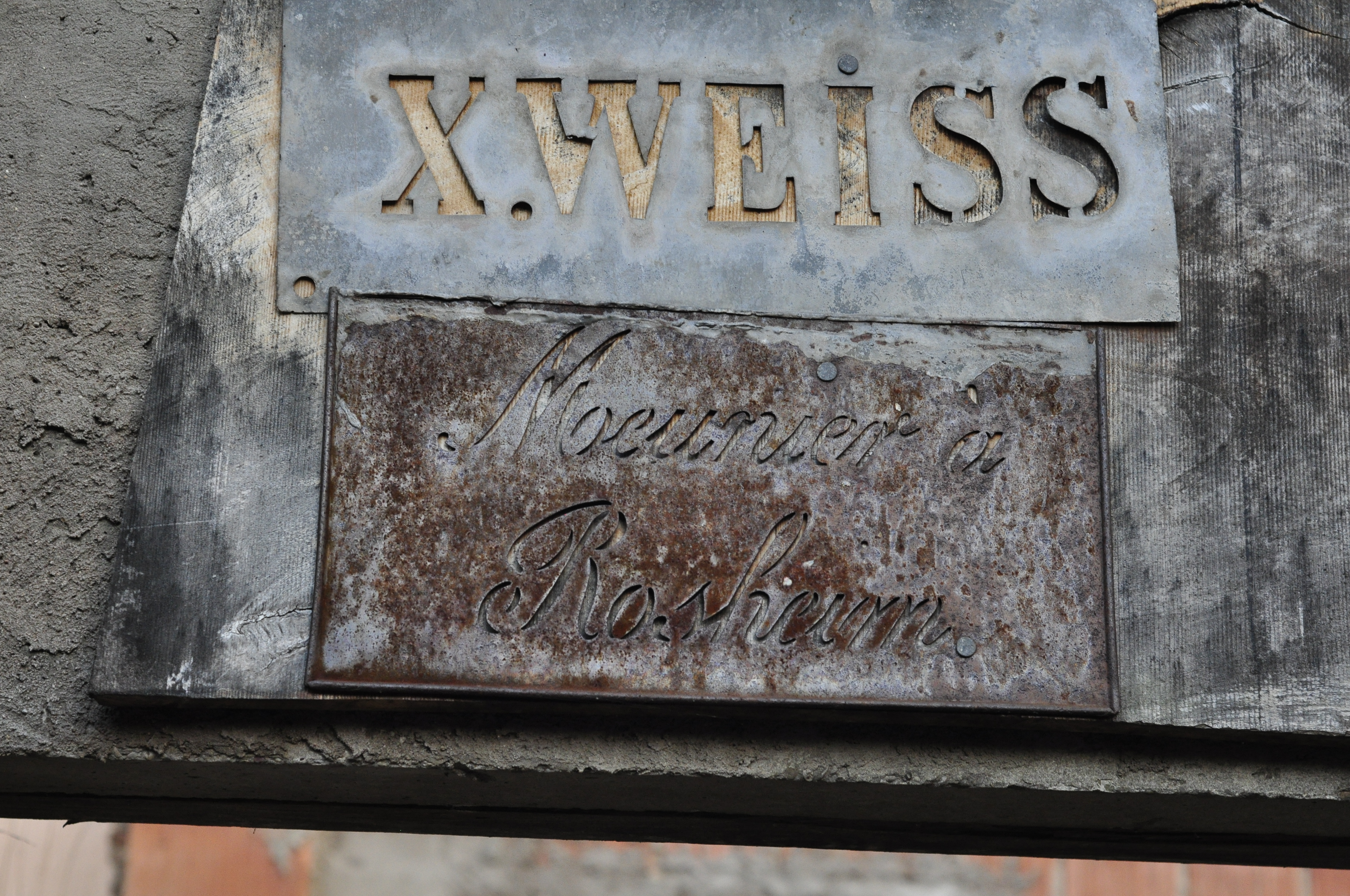 Plaque vestige d'un ancien moulin sur le Rosenmeer